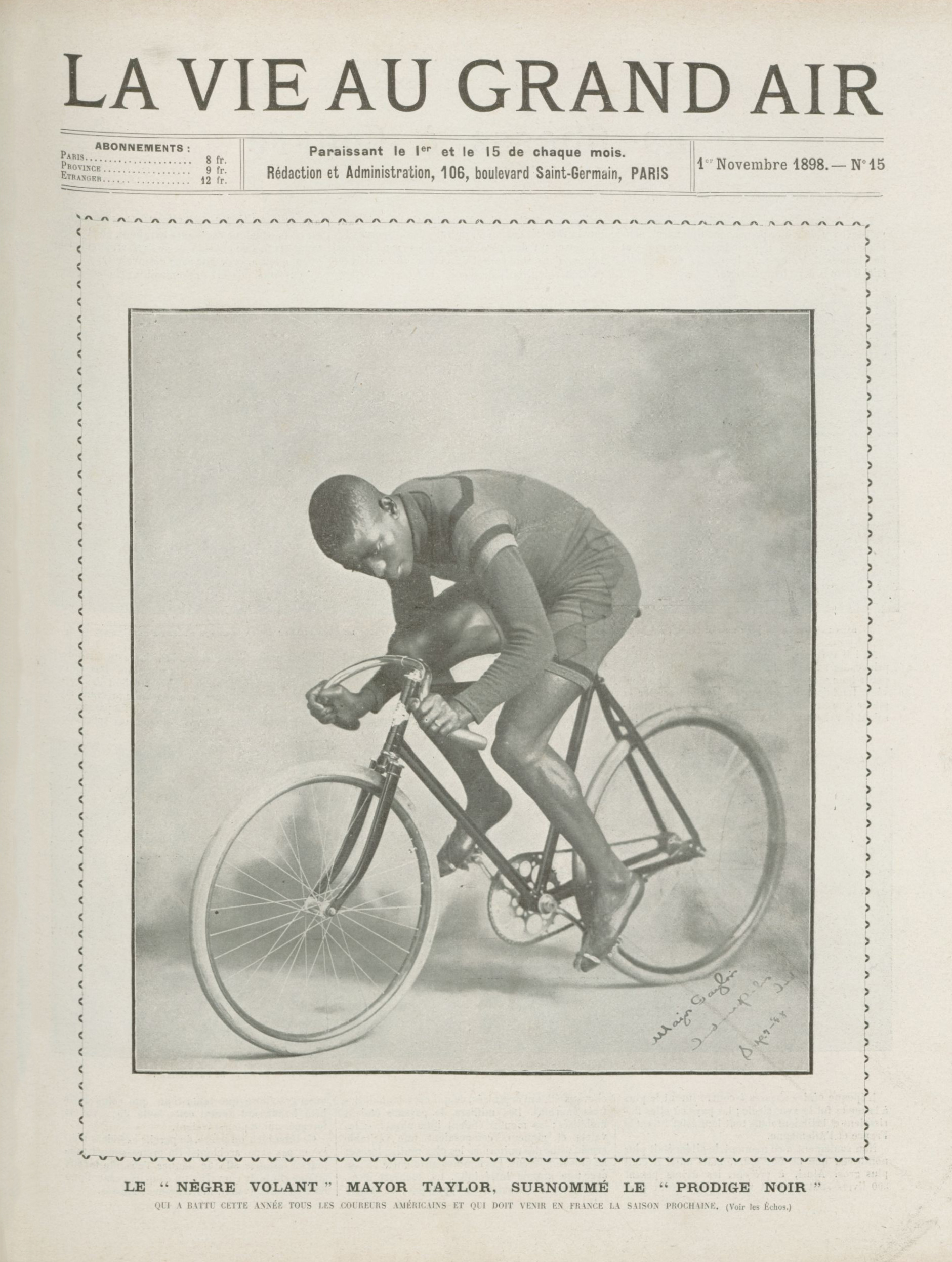 La Vie au grand air n°15 du 1er novembre 1898 (bimensuel). Légende photo : Le Nègre volant Mayor Taylor surnommé le « prodige noir ». [The First African American World Champion Cyclist].